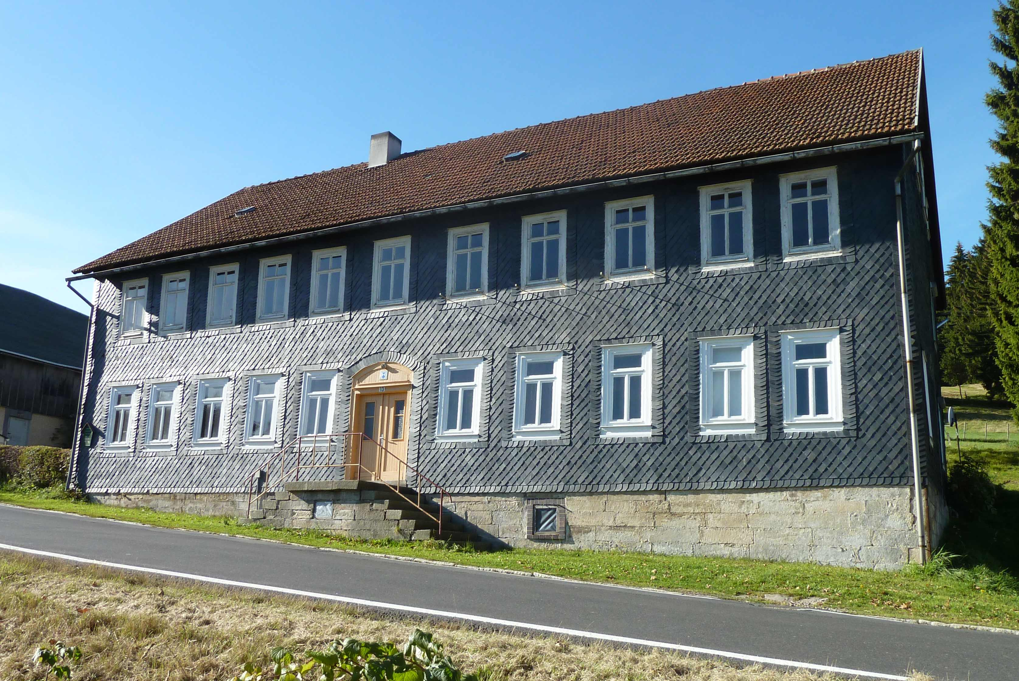 Wohnhaus, Fachwerkbau, 18./19. Jahrhundert, Geburtshaus von Gotthelf Greiner (*22.2.1732), Alsbach, OT von Scheibe-Alsbach, Hauptstraße 13